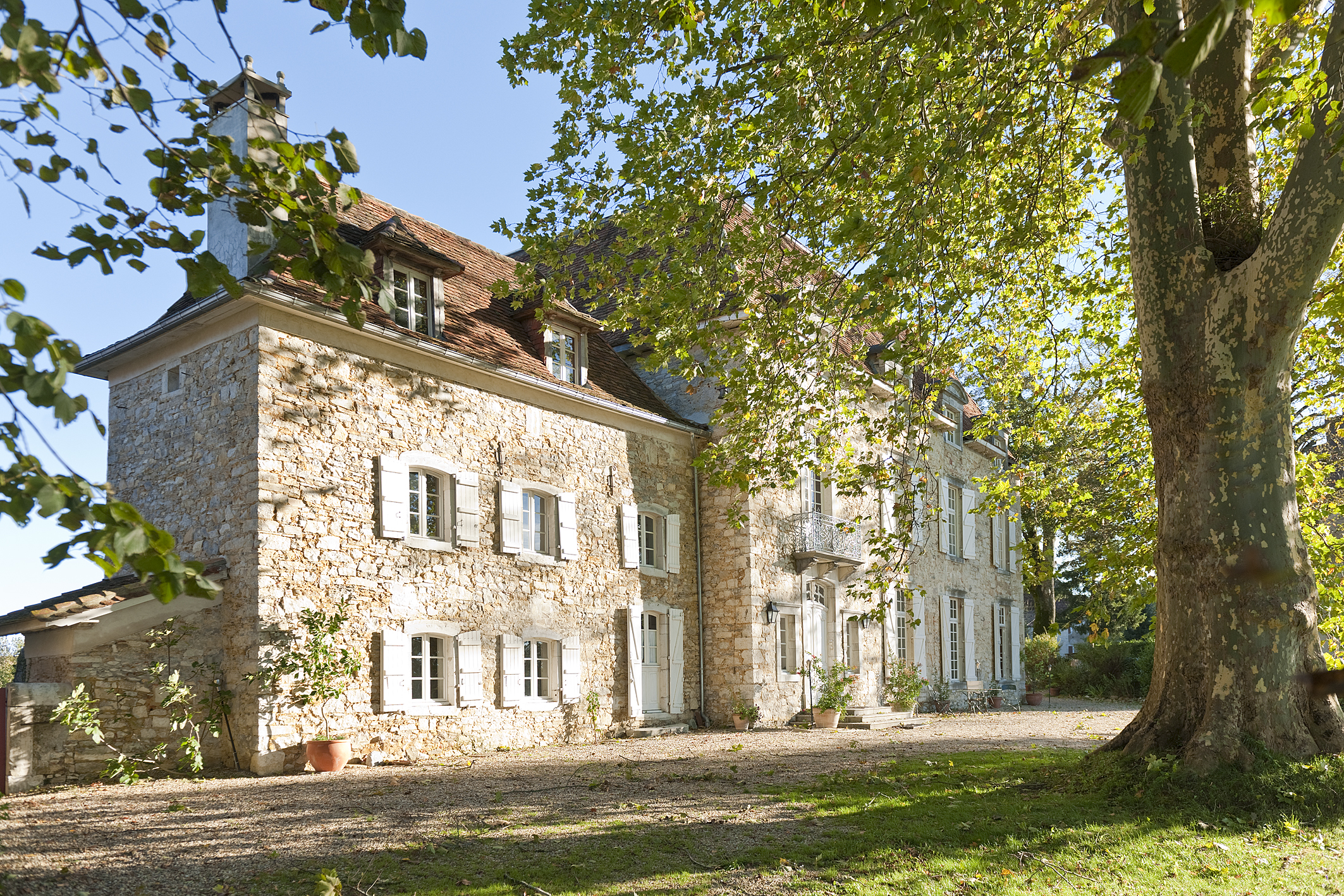 Aufnahme der Südseite des Château d´Orion